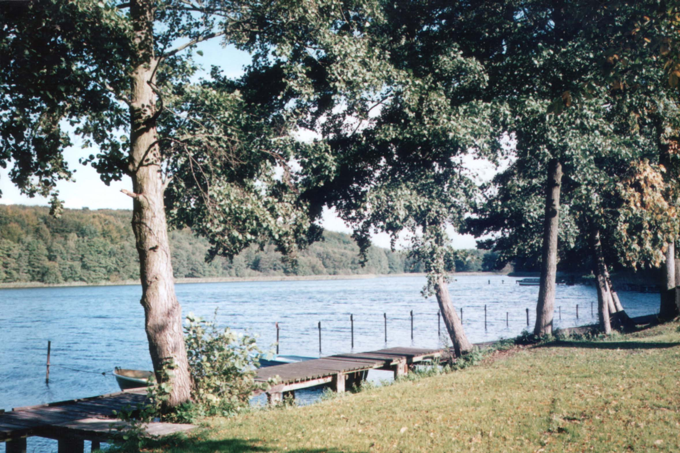 Dolgener See Datum: Oktober 1994 Urheber: Michael Pfeiffer Quelle: privates Fotoalbum